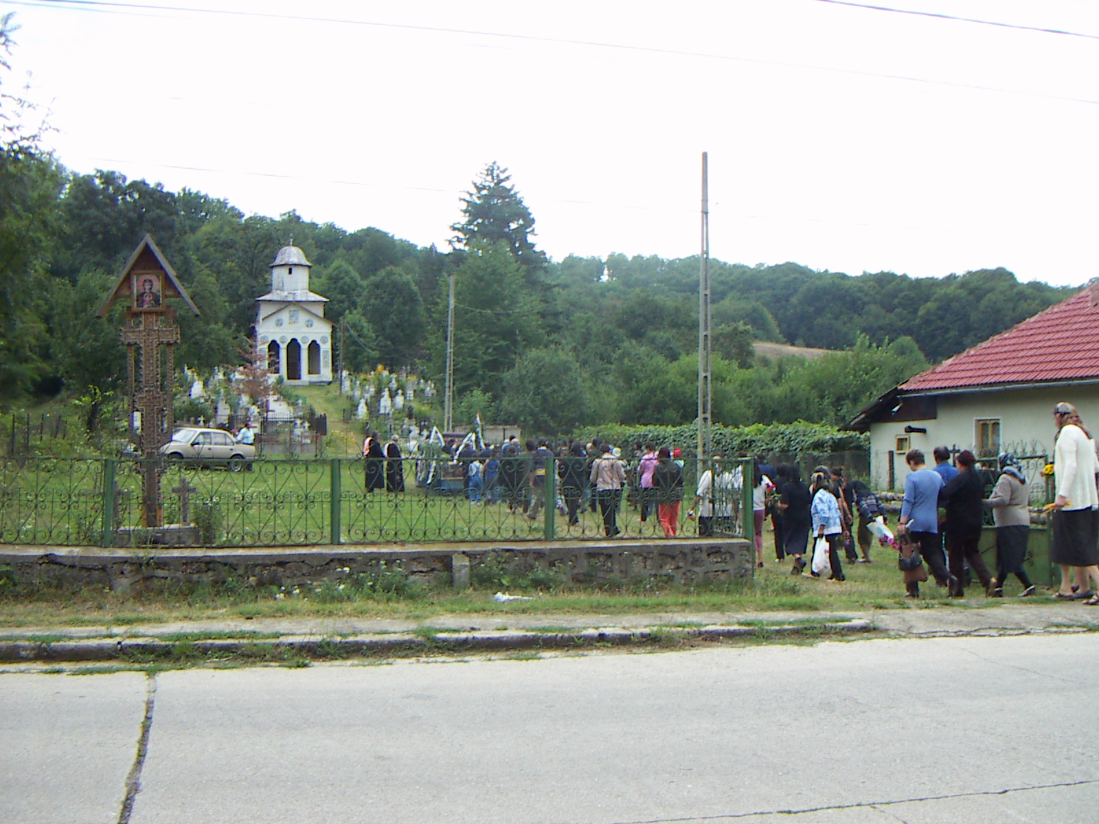 Biserica "Buna Vestire" din oraşul Tismana, Gorj construită la 1720, ref. sec. XX